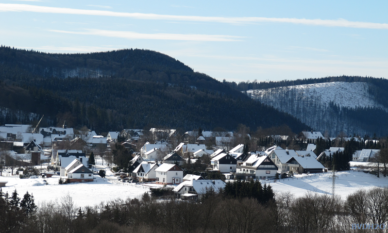 Winteropname van Küstelberg, NRW